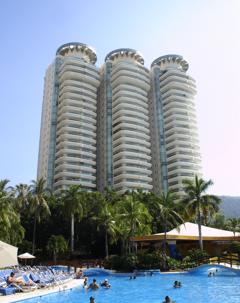 Las Torres Costa Victoria desde la alberca del Hotel Hyatt Regency Acapulco en Acapulco, Guerrero, México.